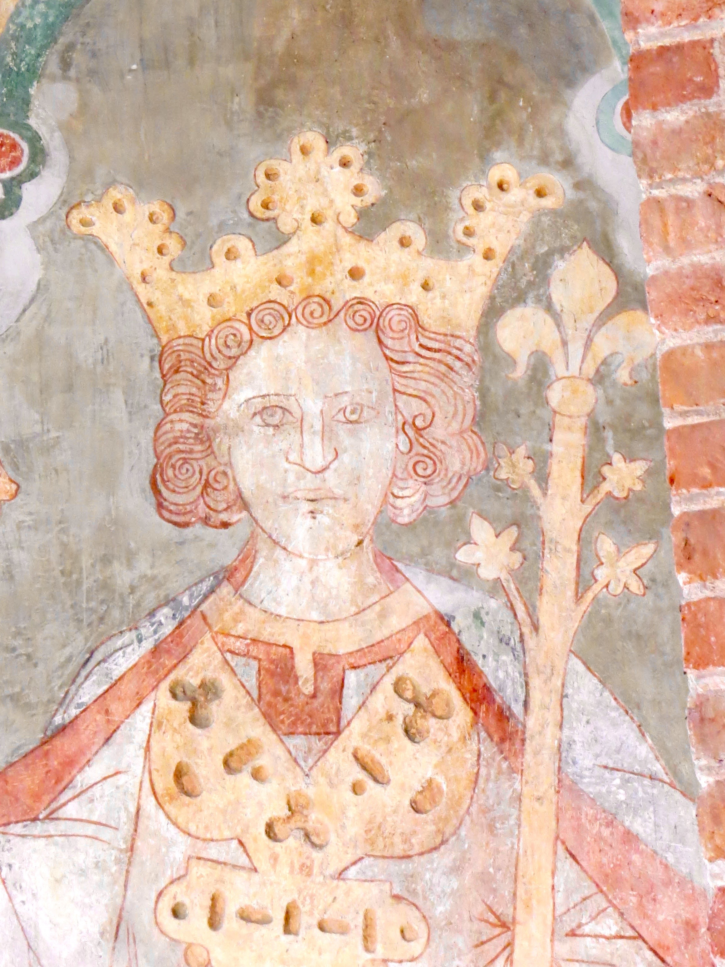 Kalkmaleri forestillende Erik Plovpenning, detalje fra korrunding i Sankt Bendts Kirke, Ringsted, Sjælland